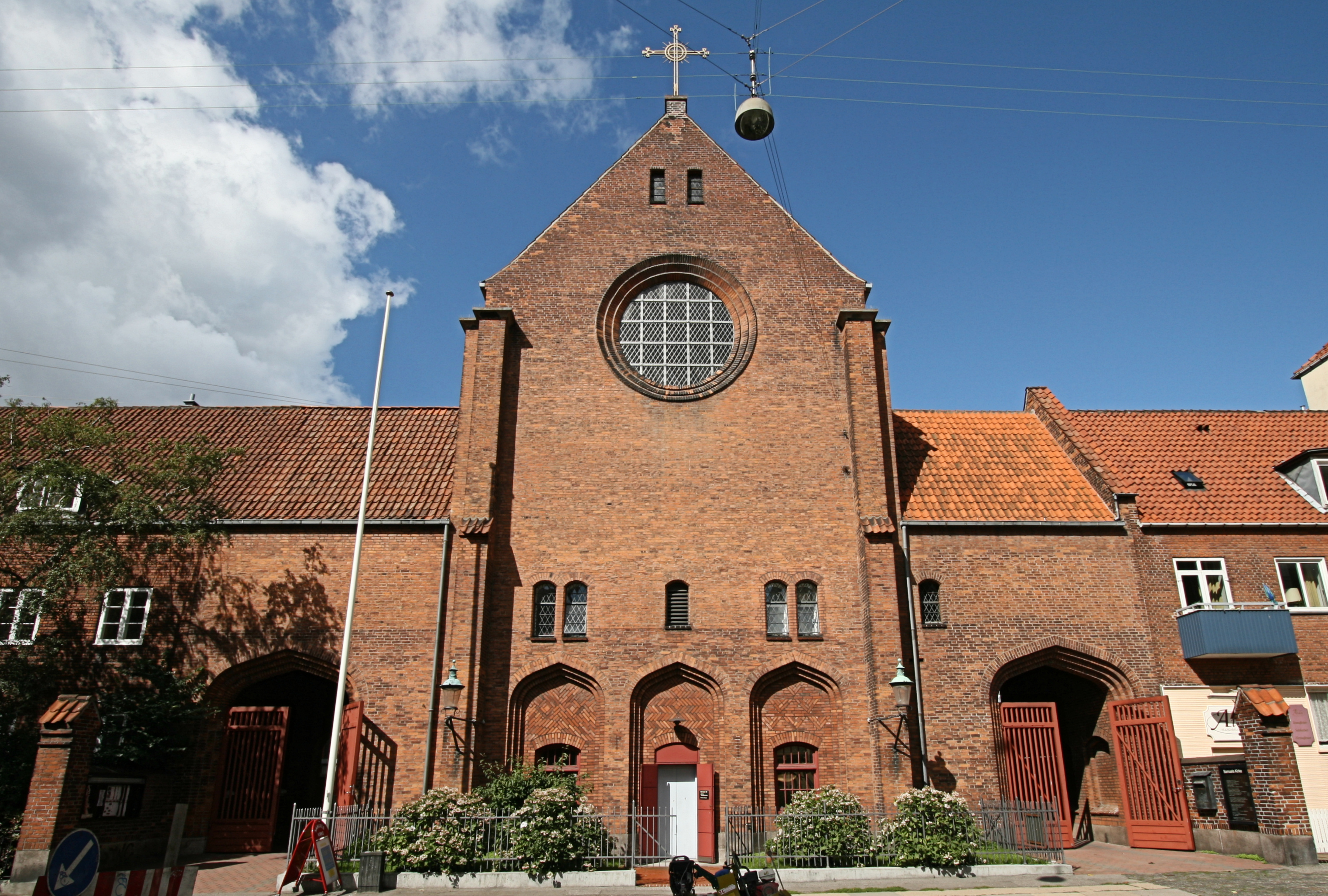 Samuels Kirke in Copenhagen, Denmark.